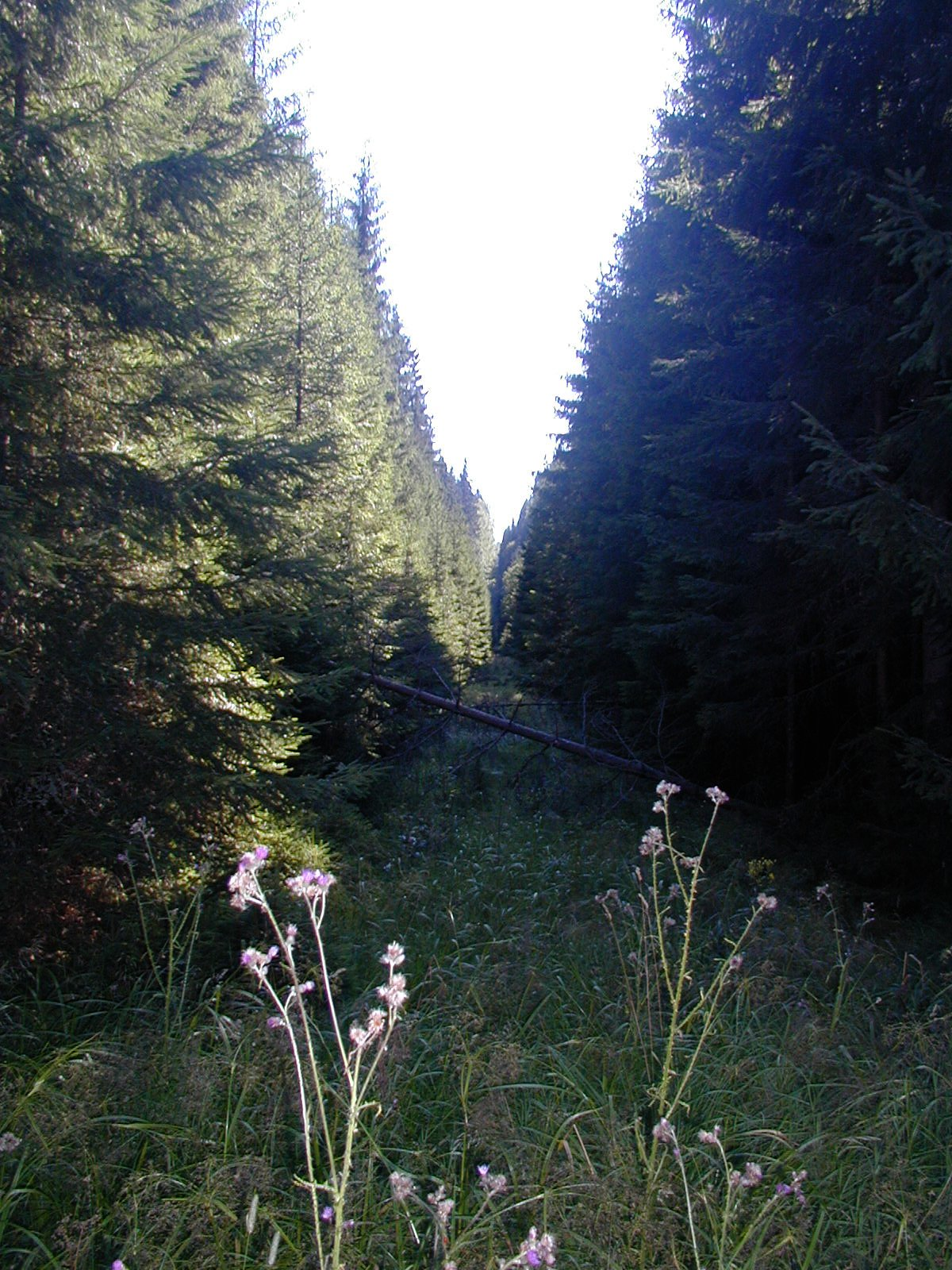 Průsek zbylý po železné oponě poblíž Žofínského pralesa.